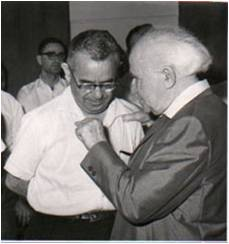 ראובן אלקלעי משוחח עם בן גוריון על עבודתו